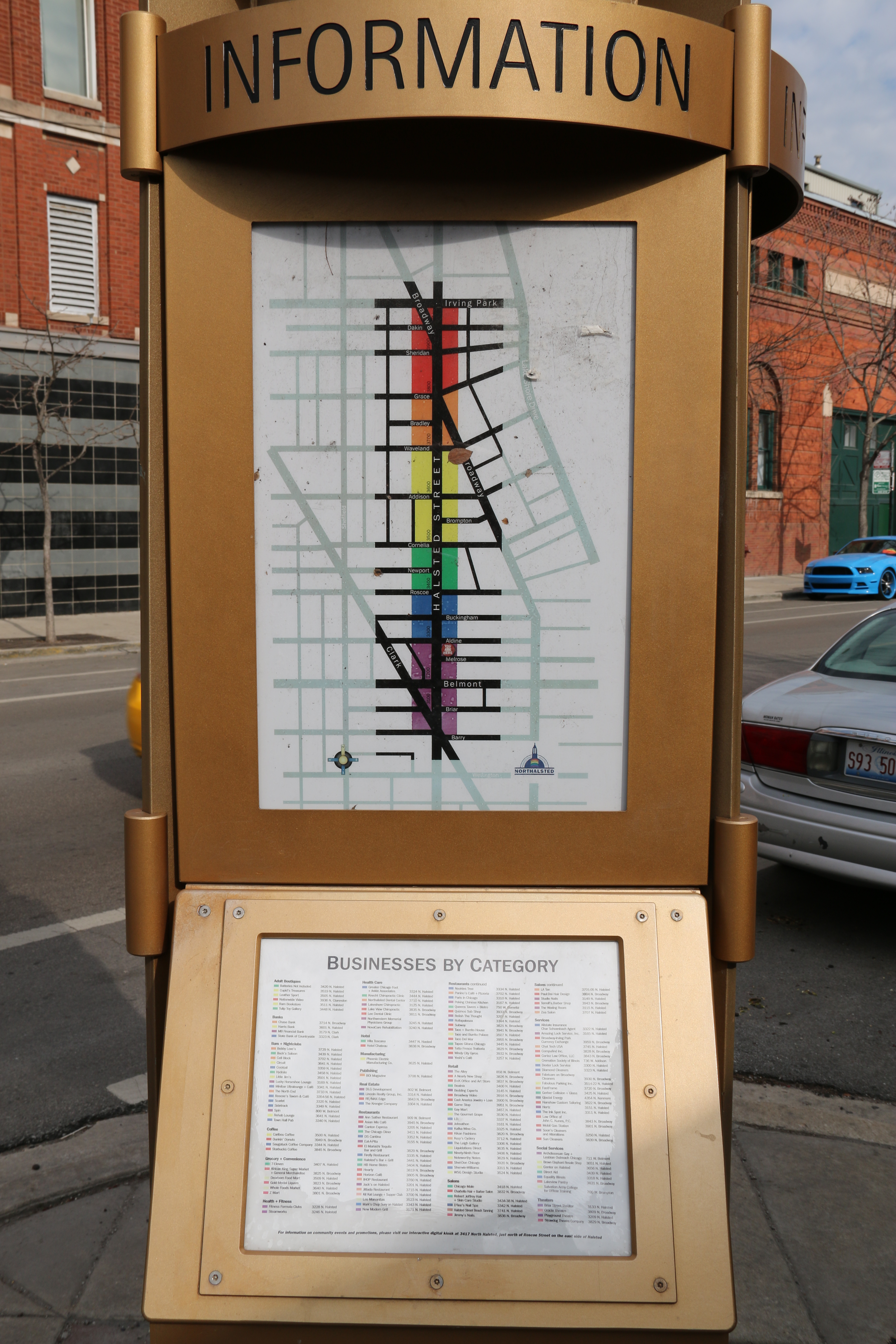 Významná ulice, která shlukuje komunitní aktivity LGBTQ lidí. Nachází se zde například světoznámé LGBTQ komunitní centrum Centre on Halsted.